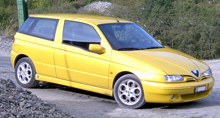 Alfa Romeo 145 Quadrifoglio Verde (mod. 99-01)